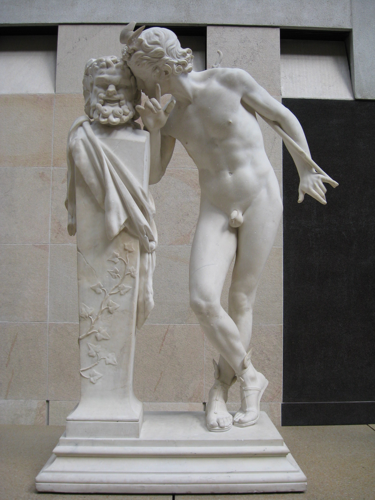 Hippolyte Moulin, Secret d'en haut (1879), marbre, Paris, Musée d'Orsay.